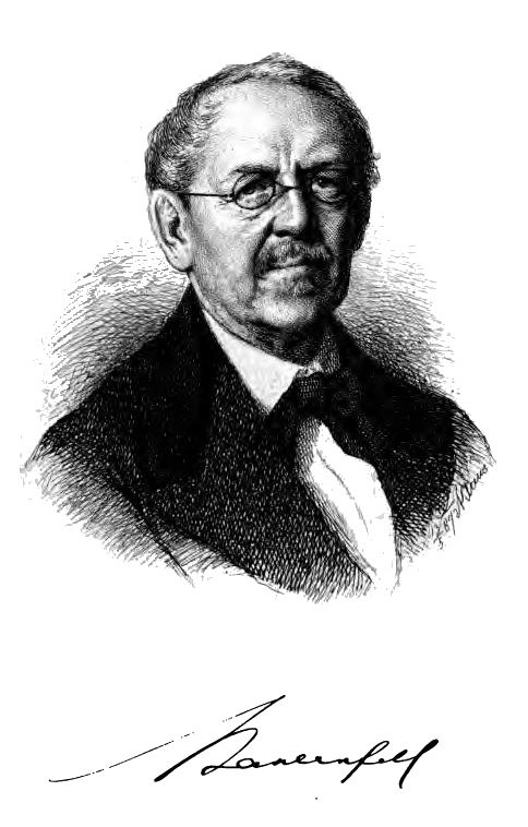 Eduard von Bauernfeld. In: Gesammelte Schriften (1871)